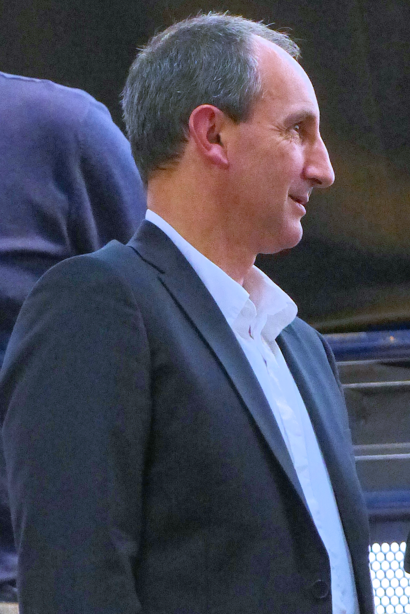 Alain Portes entraîneur de l'équipe de France de handball féminin. Le 24 mai 2014 lors de la coupe de France féminine de handball à la Halle Carpentier (Paris 13e).